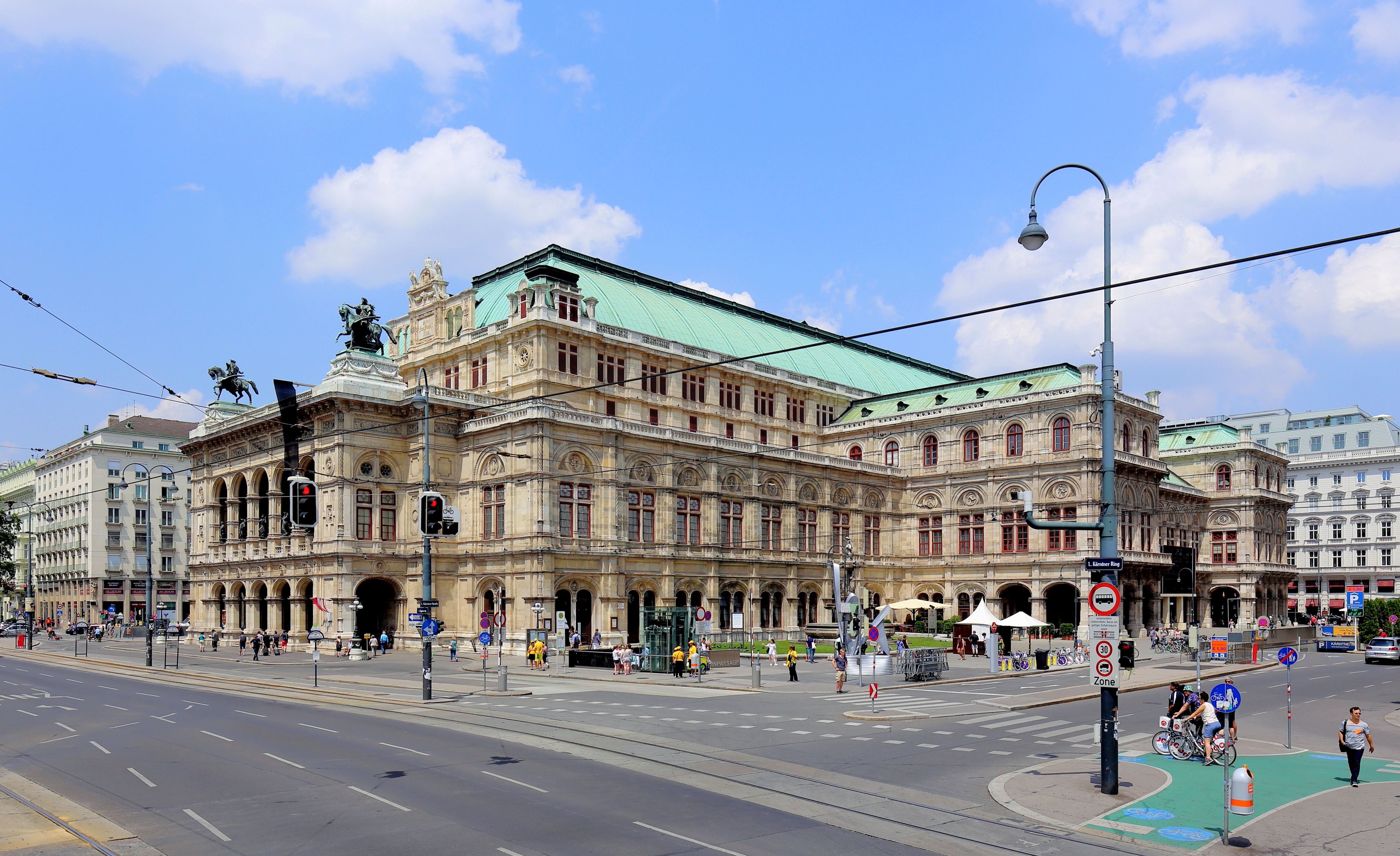 Südostansicht der Wiener Staatsoper (vom Kärntner Ring). Das Opernhaus wurde ab Ende 1861 nach Plänen der Architekten August Sicard von Sicardsburg und Eduard van der Nüll im Stil der Neorenaissance errichtet. Nach amerikanischen Bombardements am 12. März 1945 geriet das Operngebäude in Brand und wurde gleich nach dem Krieg wieder aufgebaut.